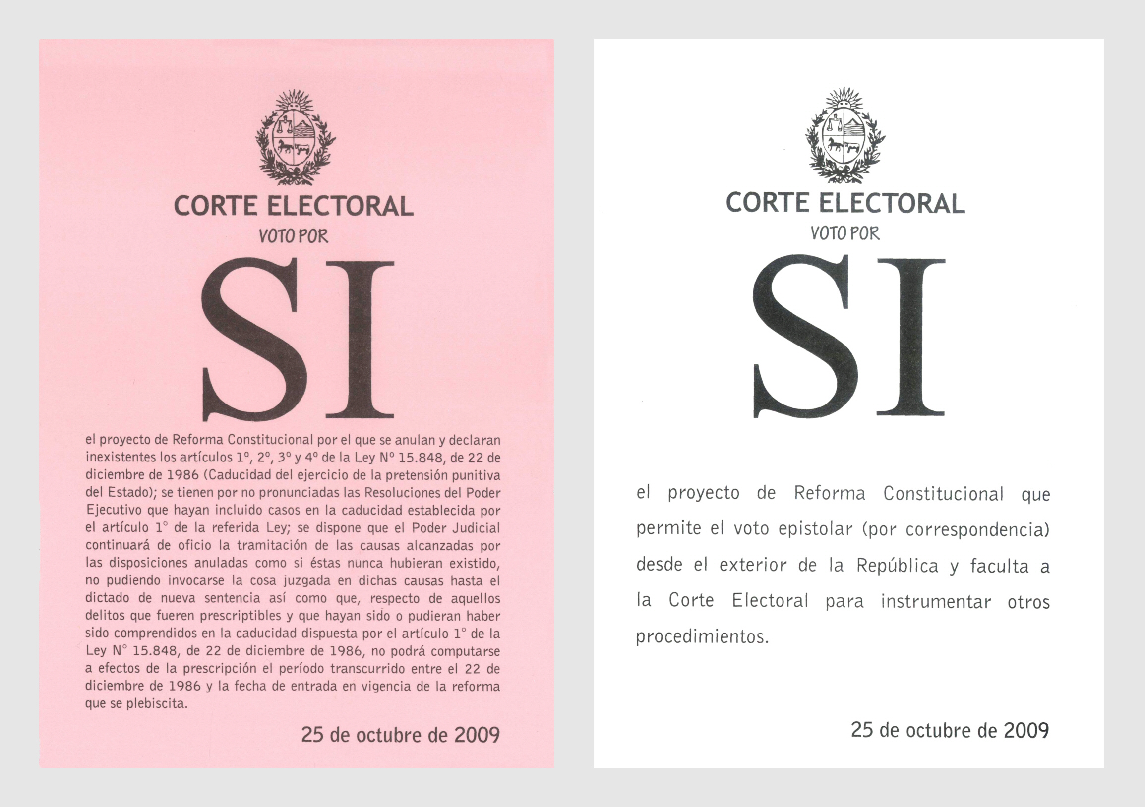 Papeletas del "Si" a los referendums por la anulación de la Ley de Caducidad y la habilitación del Voto Epistolar a realizarse en octubre de 2009 en Uruguay.